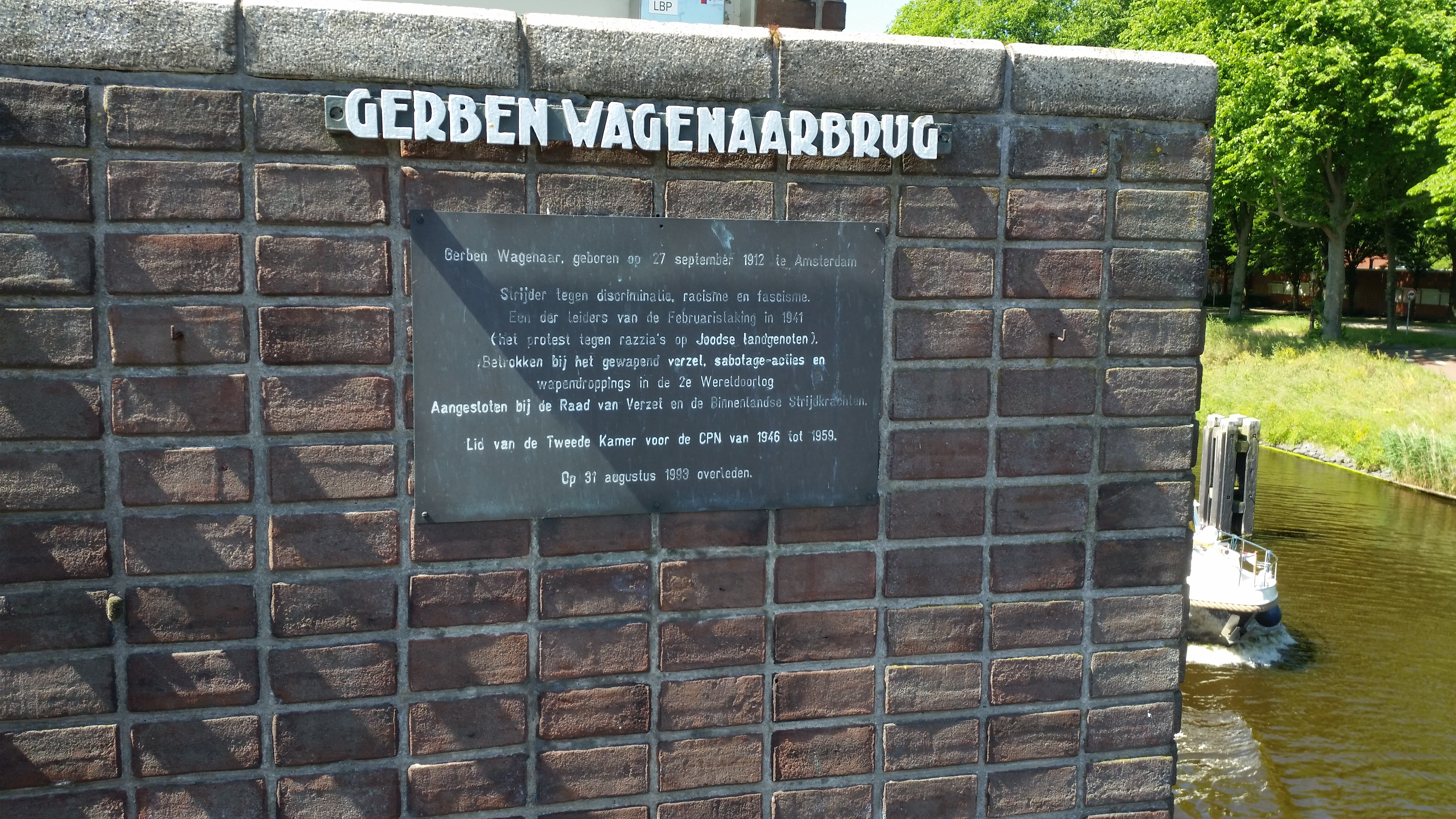 Impressie van de Gerben Wagenaarbrug (brug 357) in Amsterdam-Noord